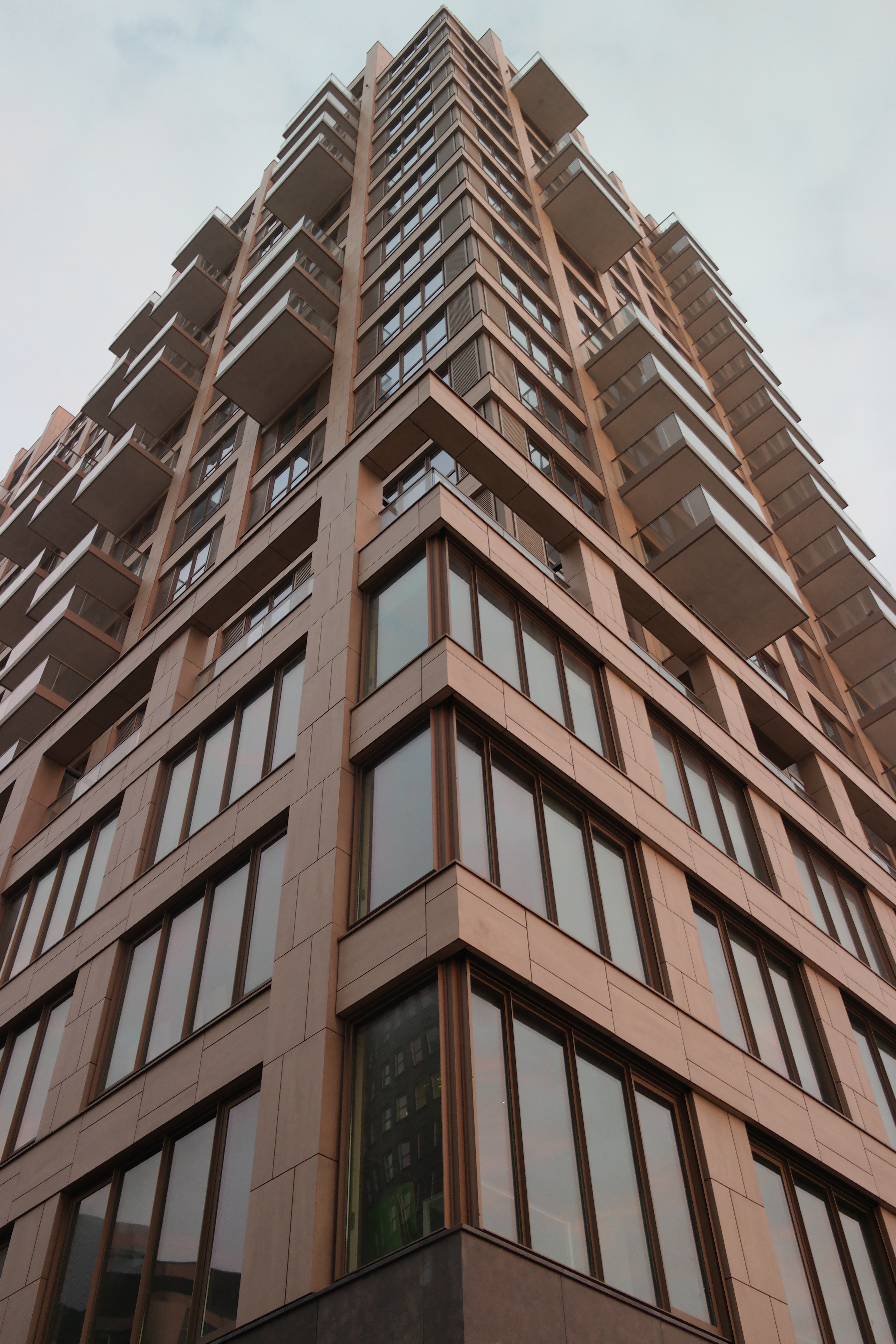 Het Wijnhavengebouw van de Universiteit Leiden Campus Den Haag.